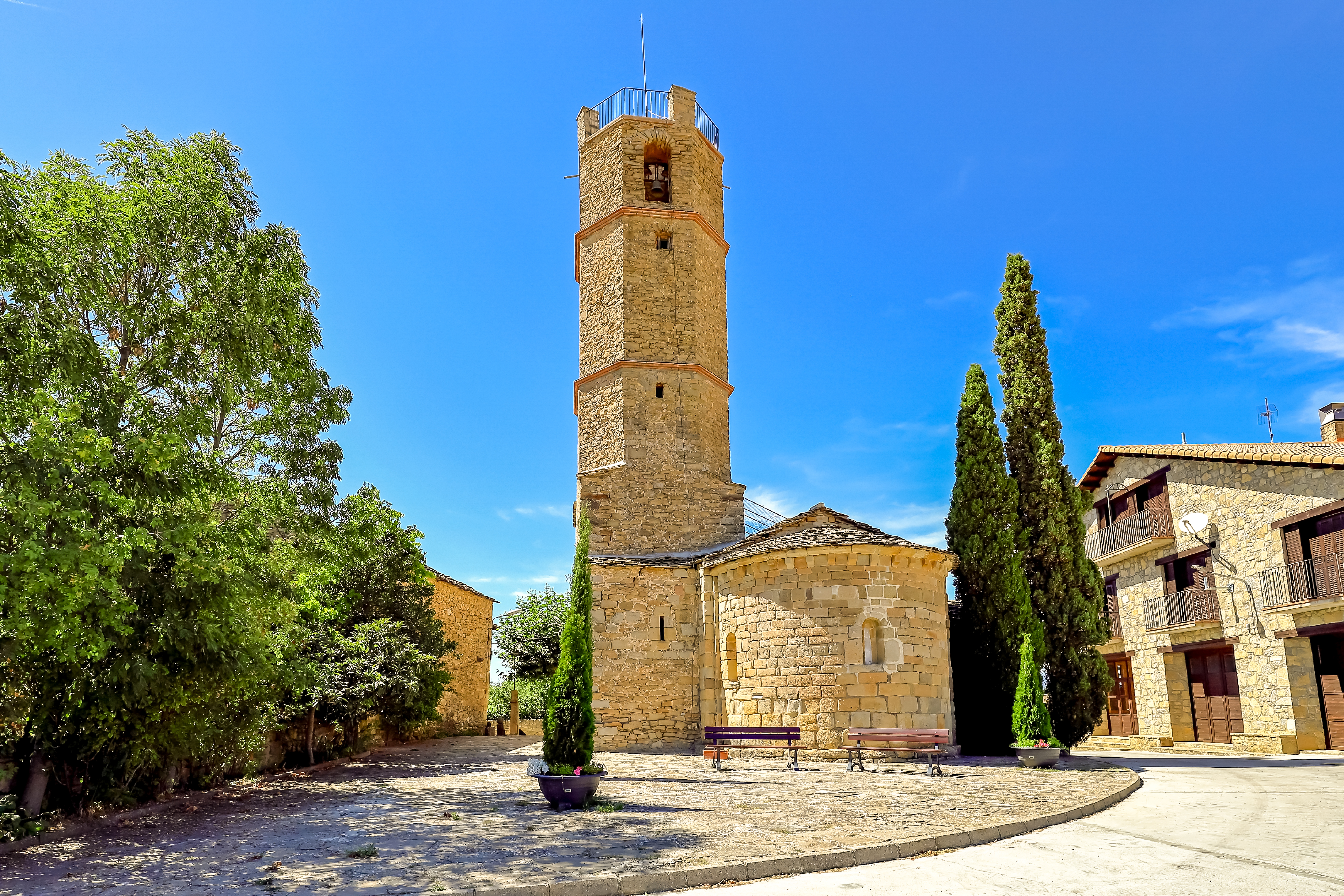 Monesma y Cajigar es un municipio de la comarca de Ribagorza en la provincia de Huesca.